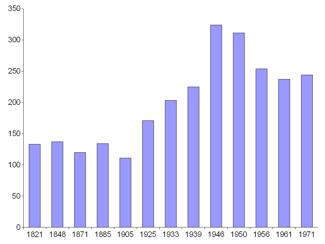 Einwohnerentwicklung von Eisten (Ortsteil der Gemeinde Sögel) zwischen 1821 und 1971